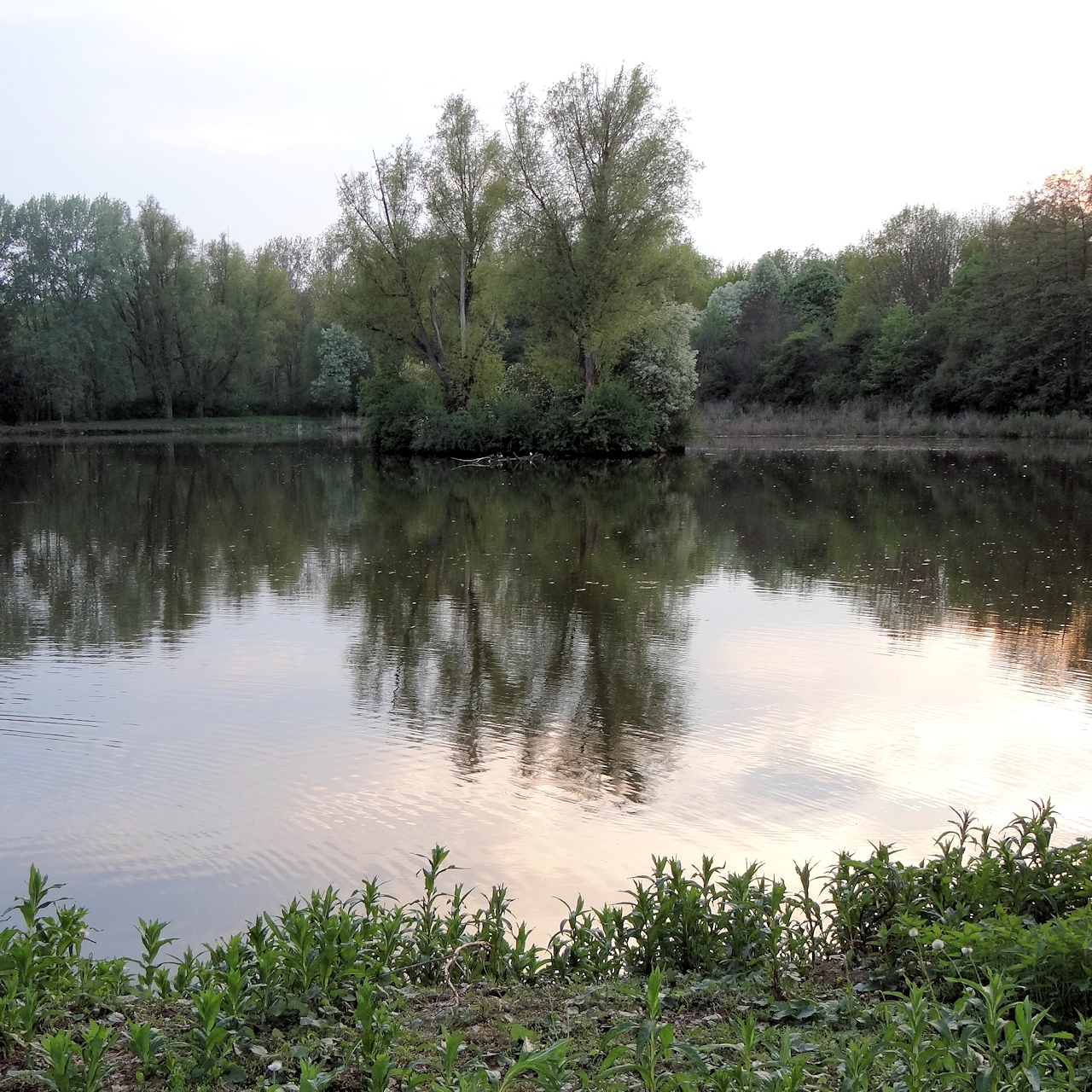 Mittlerer Raffteich mit Insel, Blickrichtung Westen